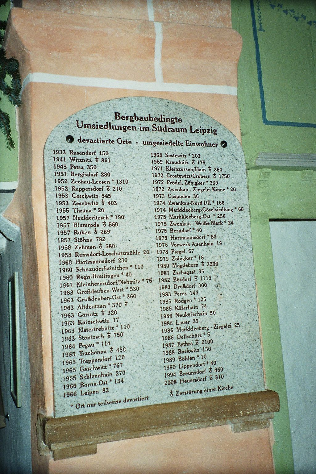 Erinnerungstafel für bergbaubedingte Umsiedlungenin in der nach Borna umgesetzten Emmauskirche aus Heuersdorf